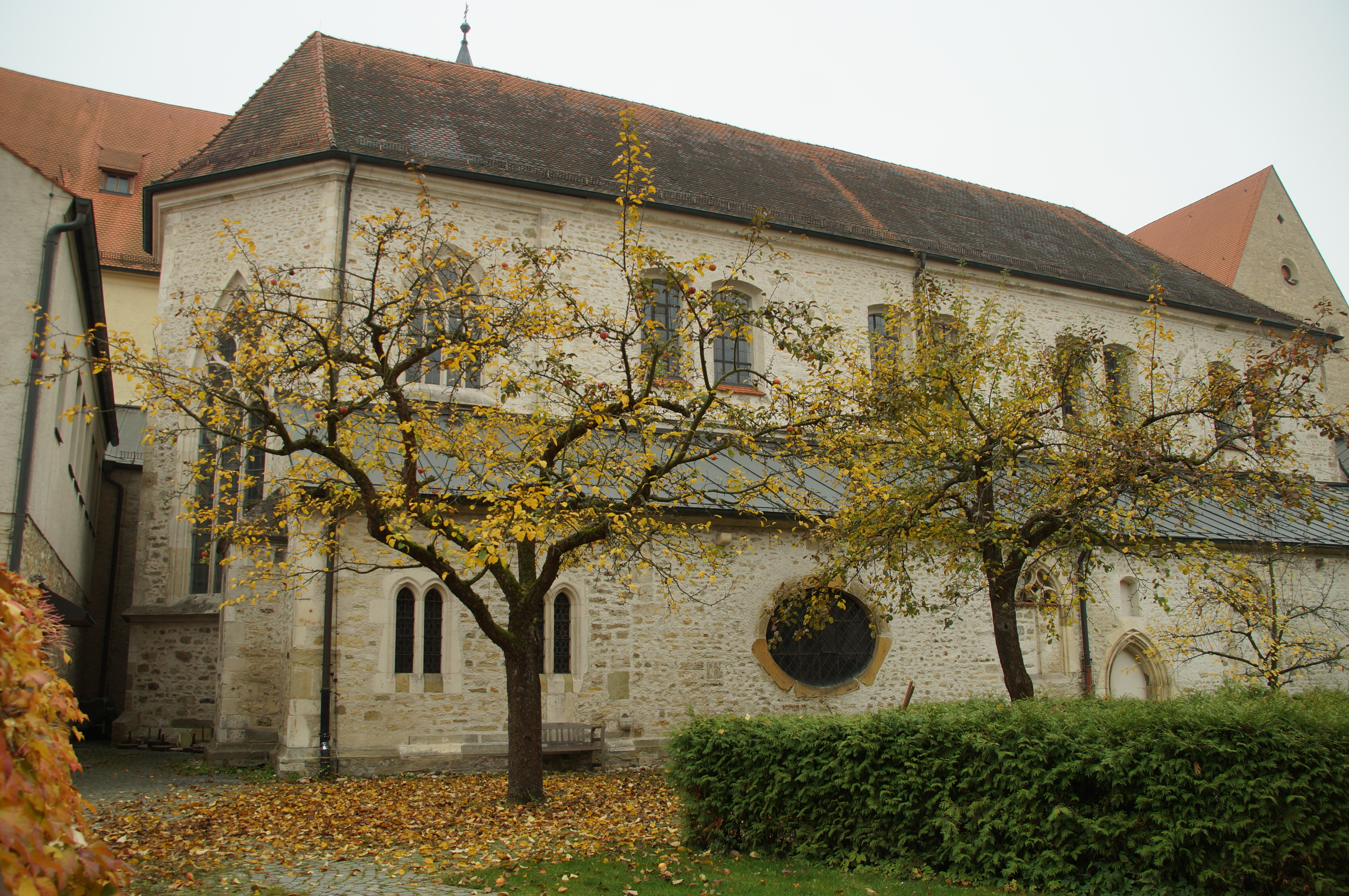 Kath.Kirche St. Rupert, ehem. Pfarrkirche des Klosters, gewölbte Saalkirche mit niedrigerem Seitenschiff und dreiseitigem Chor, Hauptschiff nach Brand 1166 erneuert, Seitenschiff bez. 1474, Barockisierung 1765 durch Johann Anton Pfeffer und Otto Gebhard; mit Ausstattung; This is a photograph of an architectural monument.